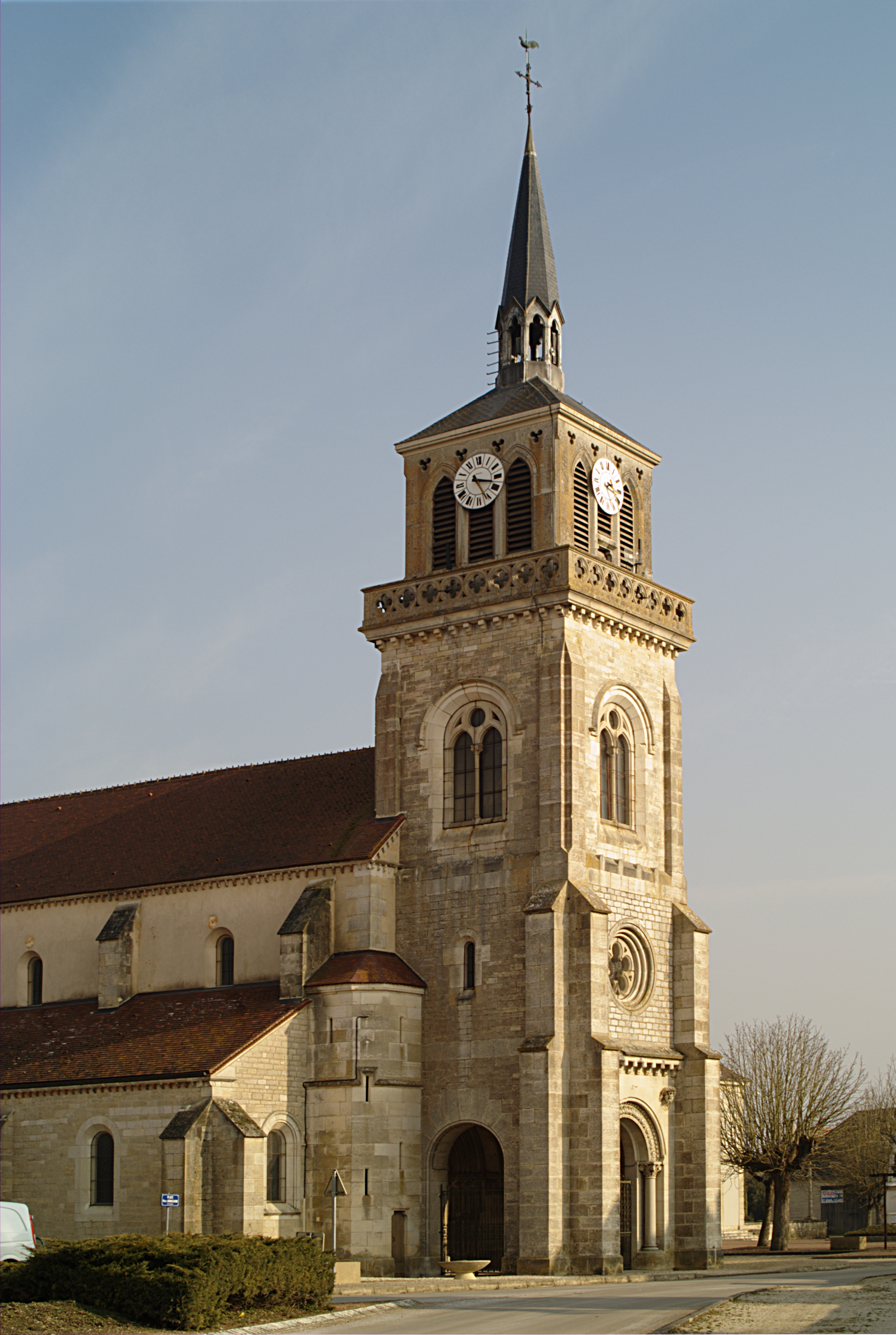 Église paroissiale de la Nativité, Esbarres (Côte d'Or, Bourgogne, France)